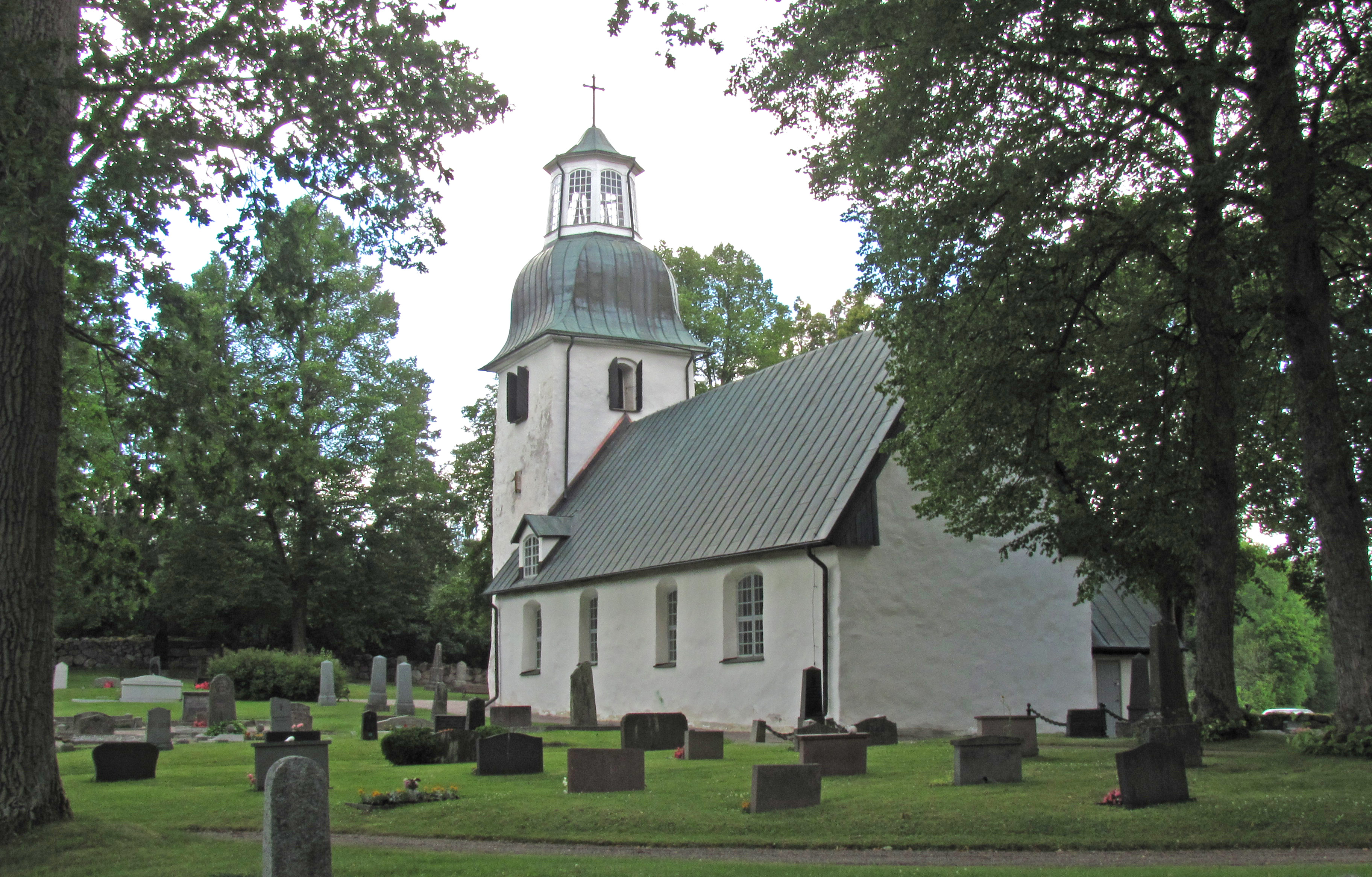 Säterbo kyrka